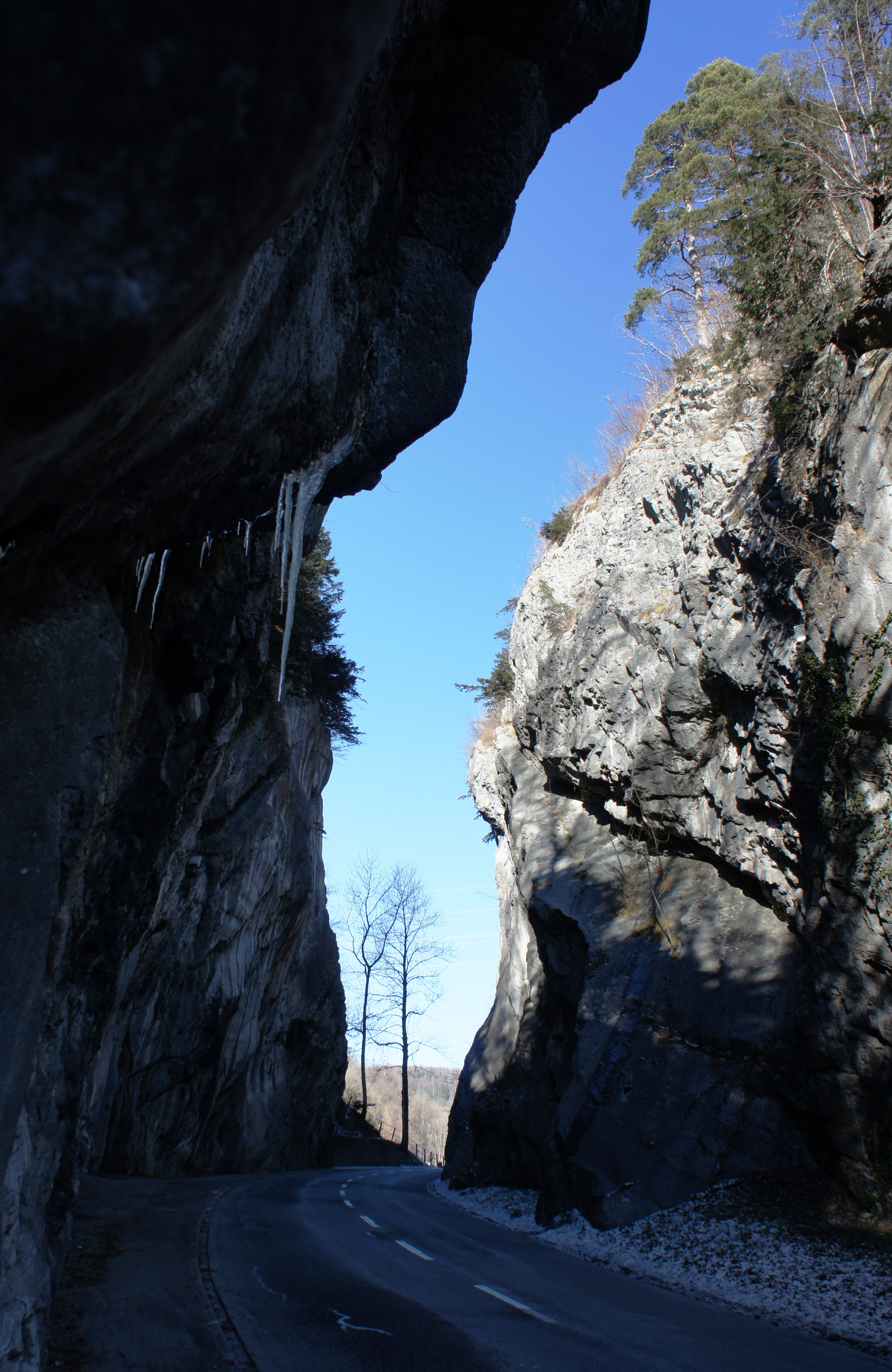 Der Hirschensprung aus Süden zwischen Rüthi und Oberriet.